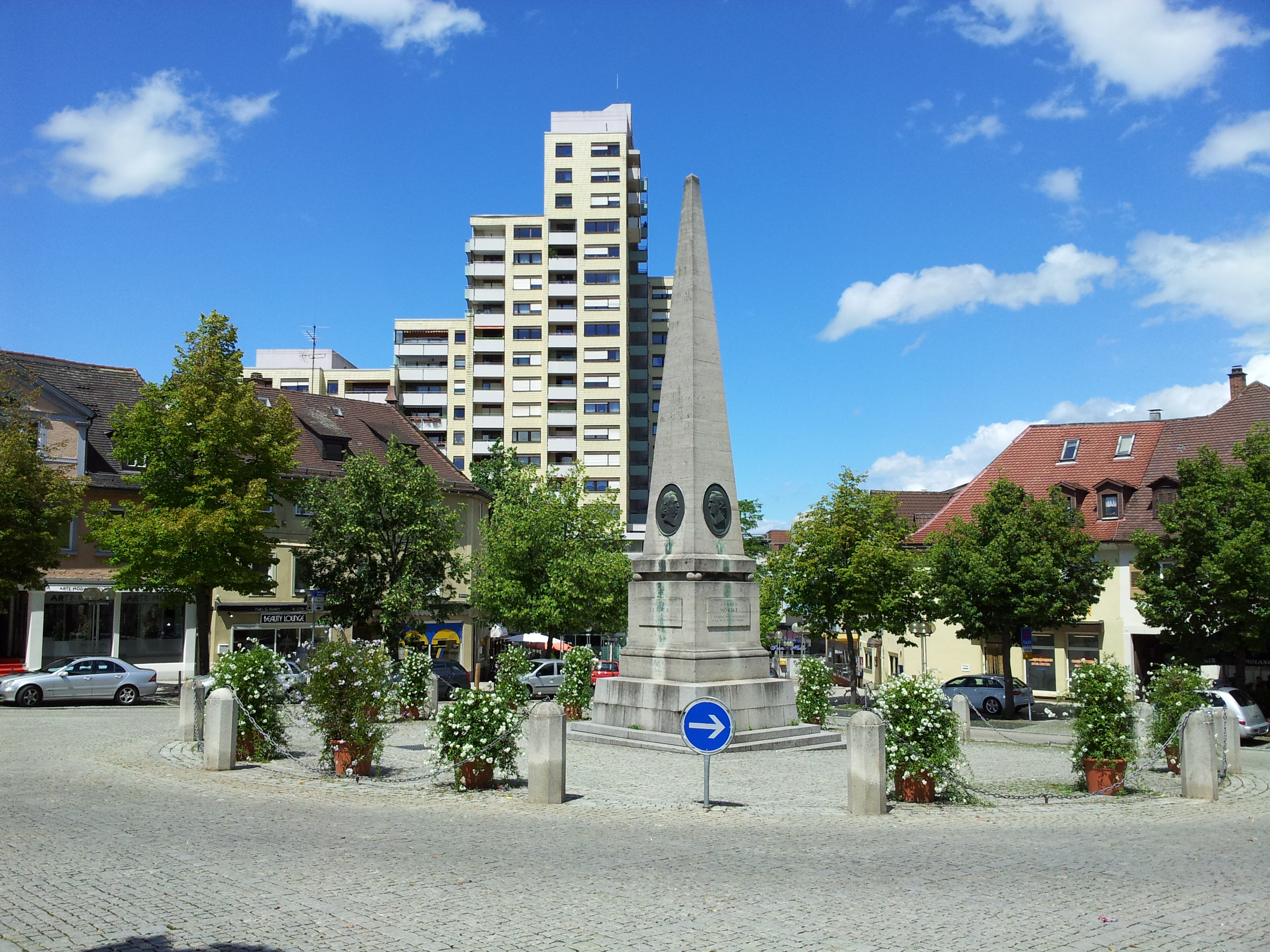 Der Holzmarkt in Ludwigsburg, Baden-Württemberg, mit dem Marstall-Center im Hintergrund.